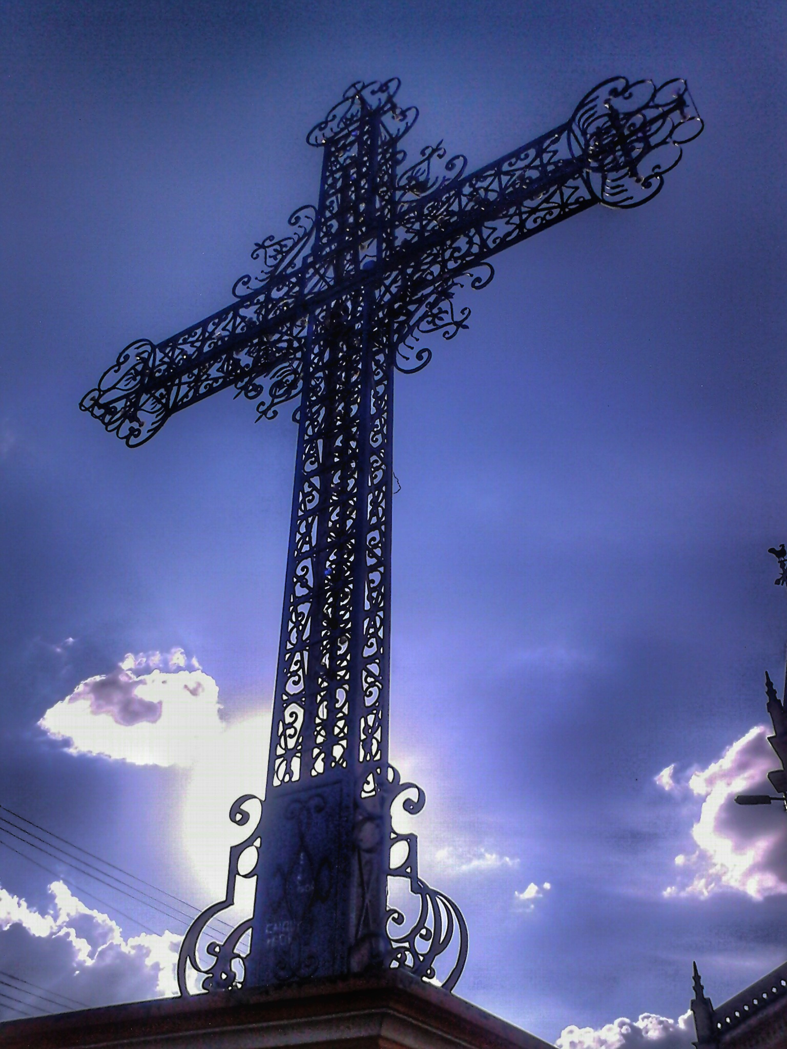 Cruzeiro no centro da cidade de Cabo verde